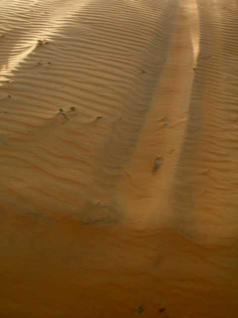 Dunes du désert de Lompoul (Sénégal)